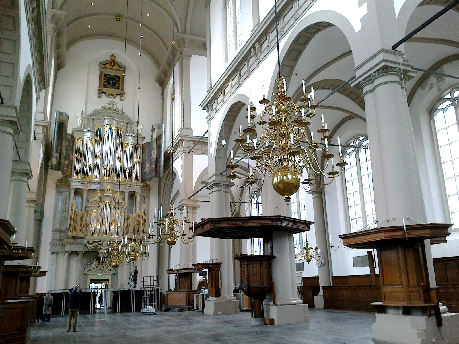 Amsterdam Wester Kerk Nef